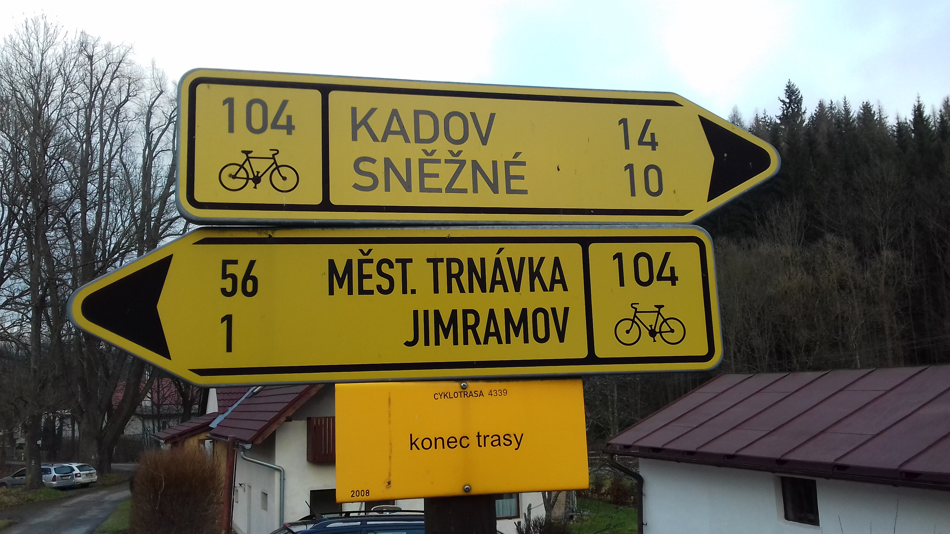 cyklistický rozcestník na okraji Jimramova